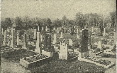 Evangelický hřbitov v Orlové v meziválečném období (před r. 1936)